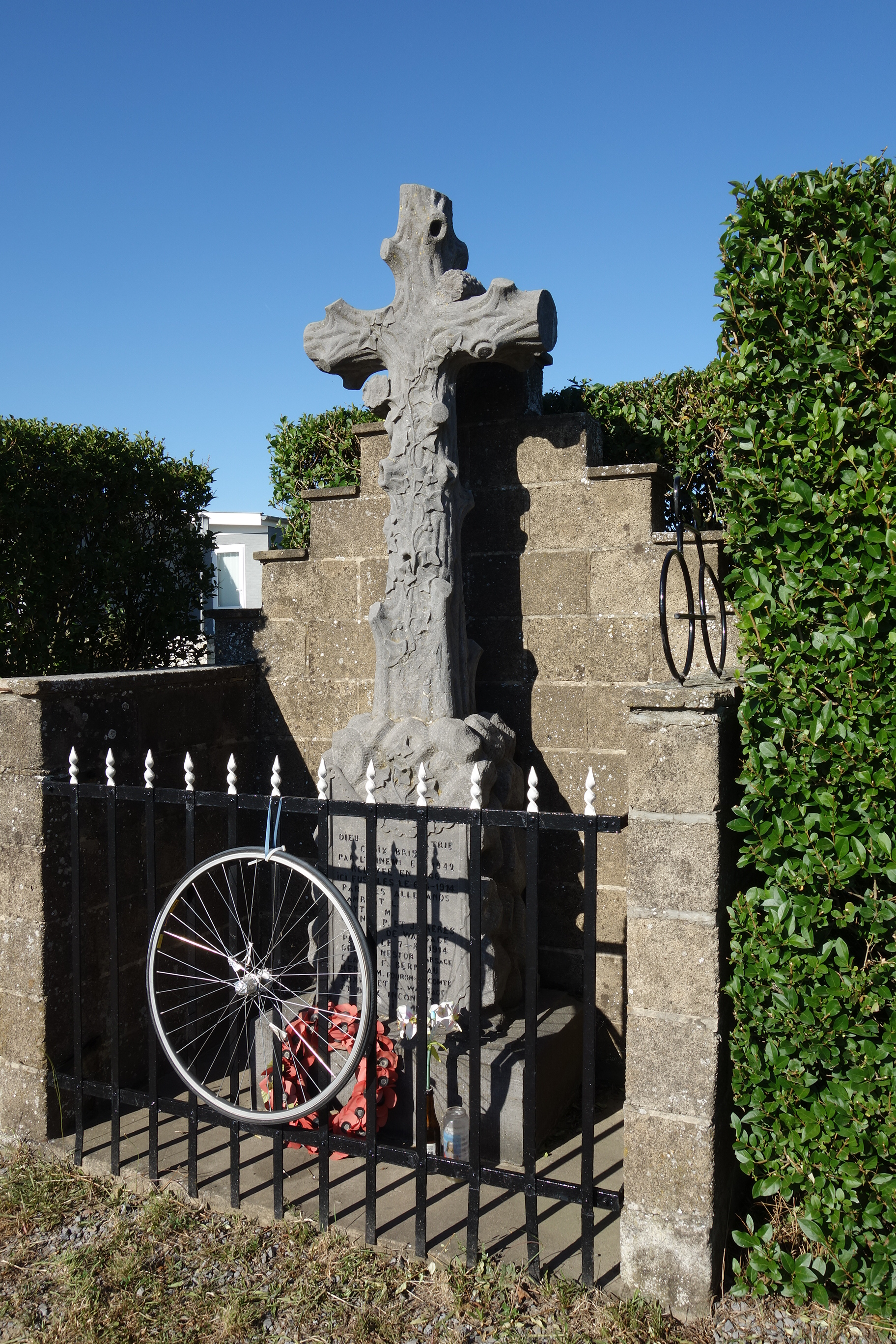 Monument voor de 'Gehangenen van Moelingen'. Tijdens de Duitse invasie begin augustus 1914 zijn nabij een Duits legerkamp in Moelingen vier personen gefusilleerd (Lucien Lambert, M. (Josepg) Luyten en de broers Pierre en Julien Franck) en zes personen opgehangen (Nestor Geelen, François Claude, Marcel Kerff, Léon Soxhelet en twee onbekenden). Het monument werd in 1942 door de Duitse bezetter vernield en in 1946 heropgebouwd. In 2019 werd een plaquette voor de opgehangen Marcel Kerff toegevoegd.